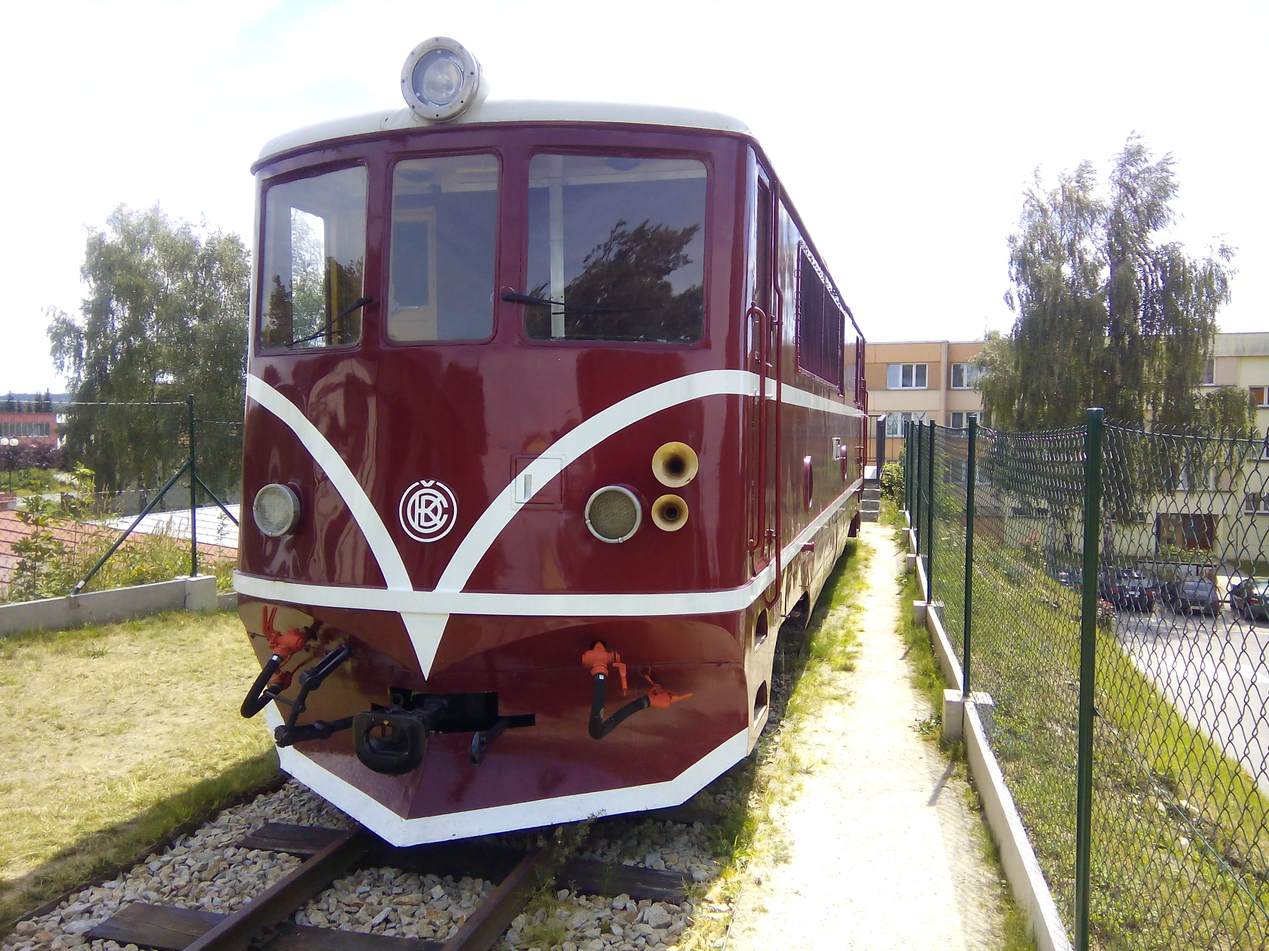 Lokomotiva ČKD T47.020 dopravce JHMD sloužící jako pomník